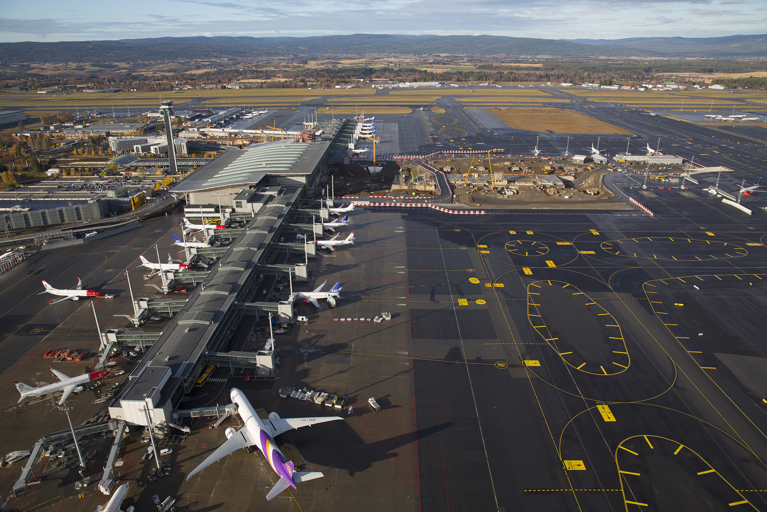 Oversiktsbilde, Oslo Lufthavn